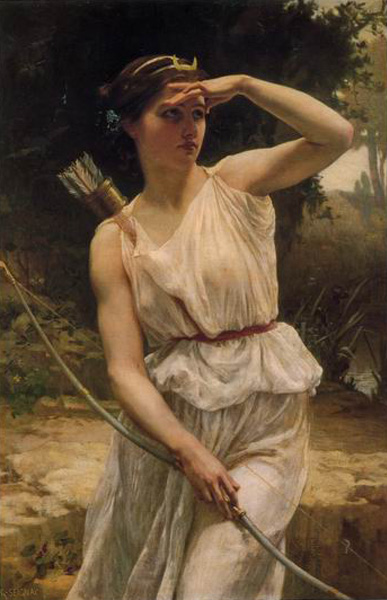 Diane chassant